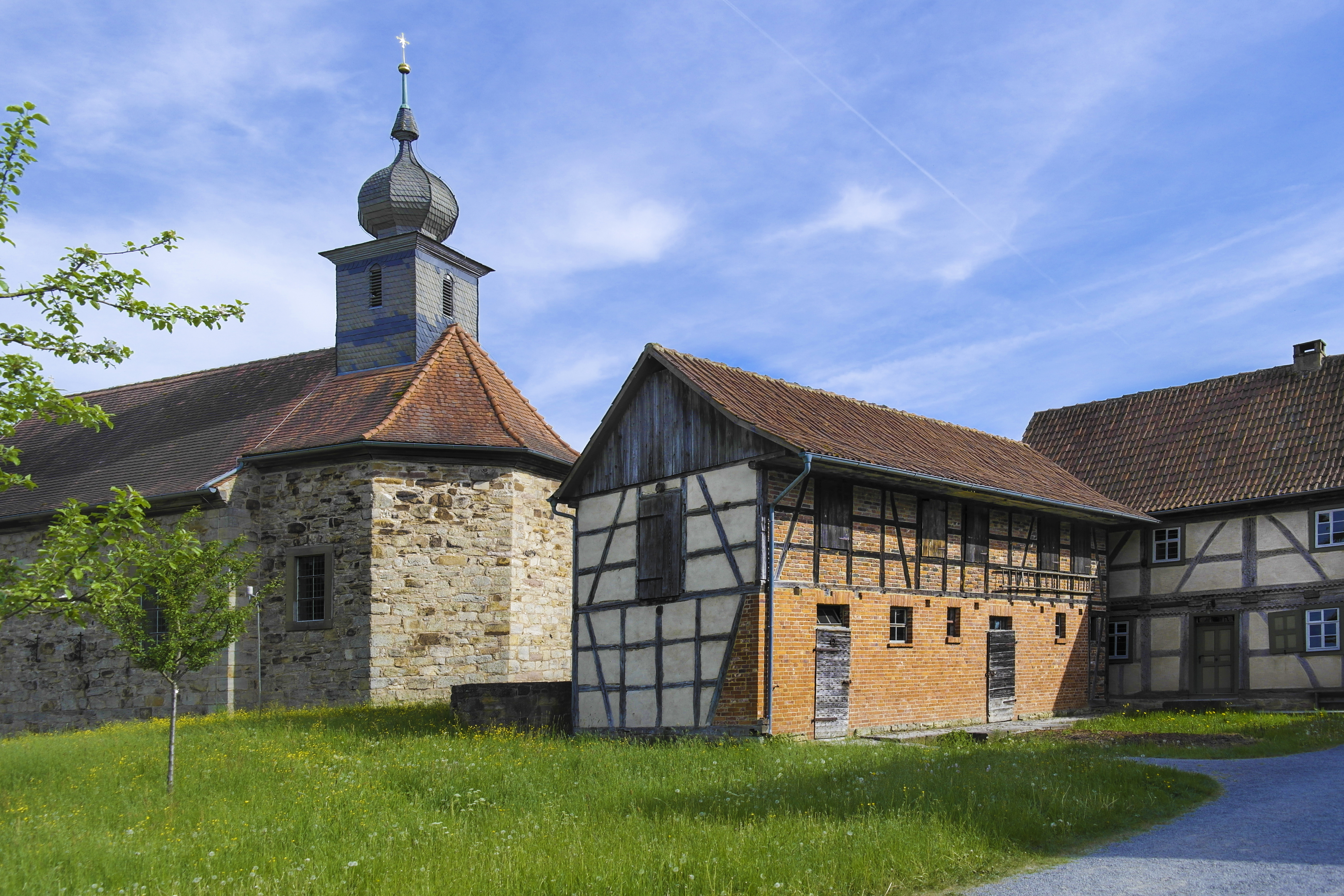 Fränkisches Freilandmuseum Fladungen, Kirche LeutershausenThis is a photograph of an architectural monument.